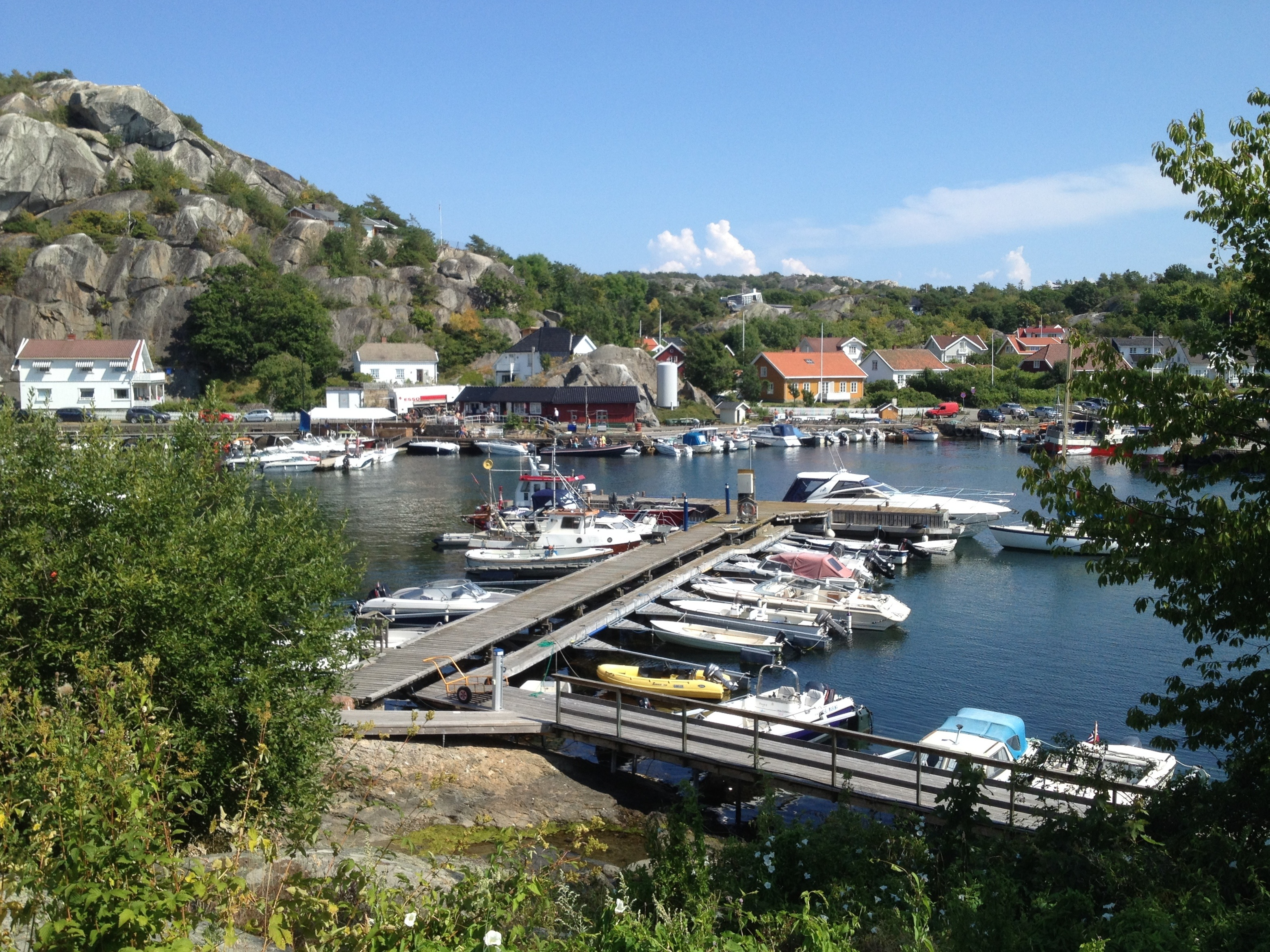 Harbour, Ula